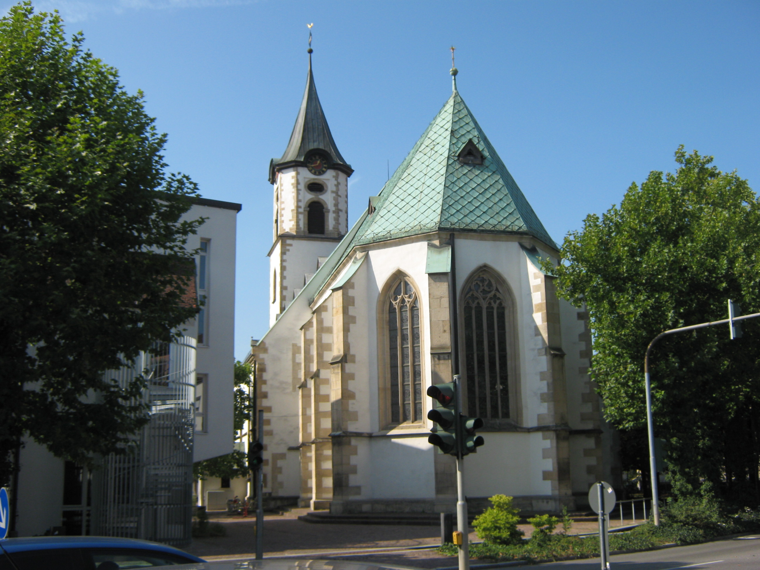 Die Martinskirche in Pfullingen ist die Urkirche des Pfullichgaus. Um 620 als Holzkirche, um 760 als karolingische Steinkirche und um 930 als frühromanische Kirche mit kreuzförmigem Grundriss umgebaut. Die dreischiffige staufische Säulenbasilika wurde 1150 errichtet, der spätgotische Chor 1463. Das Langhaus wurde 1579 modernisiert und das barocke obere Turmgeschoß mit achtseitgem Spitzhelm 1773 aufgesetzt. 1982 fand eine weitere Renovierung statt.